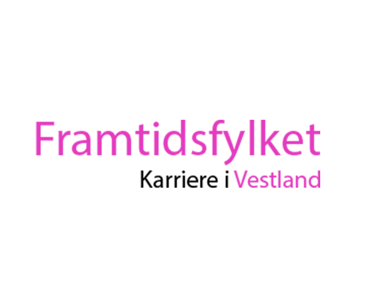 Framtidsfylket logo